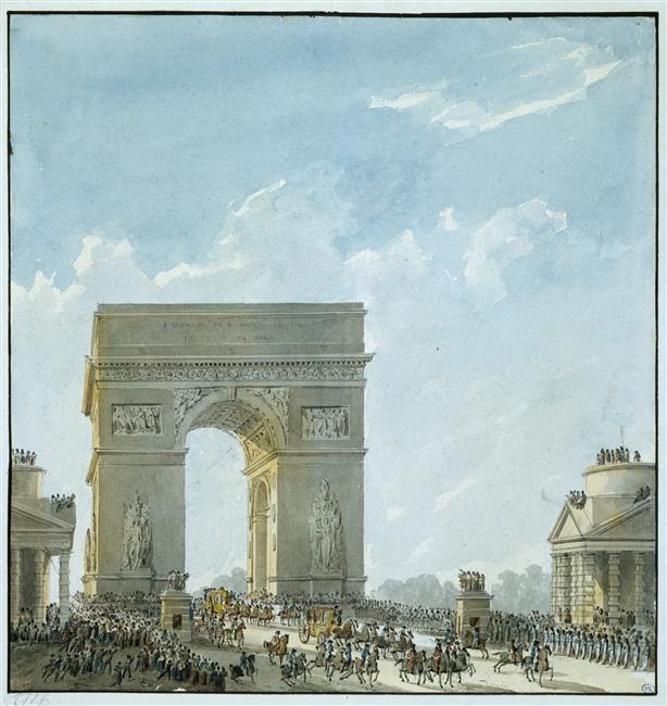 Pierre-François-Léonard Fontaine (1762-1853) Entrée dans Paris de l’Empereur et l’Impératrice, dessin, Louvre A l’entrée solennelle de l’Empereur et de l’archiduchesse Marie-Louise, en 1810, Chalgrin fit élever une maquette en charpente et en toile de l’arc de triomphe